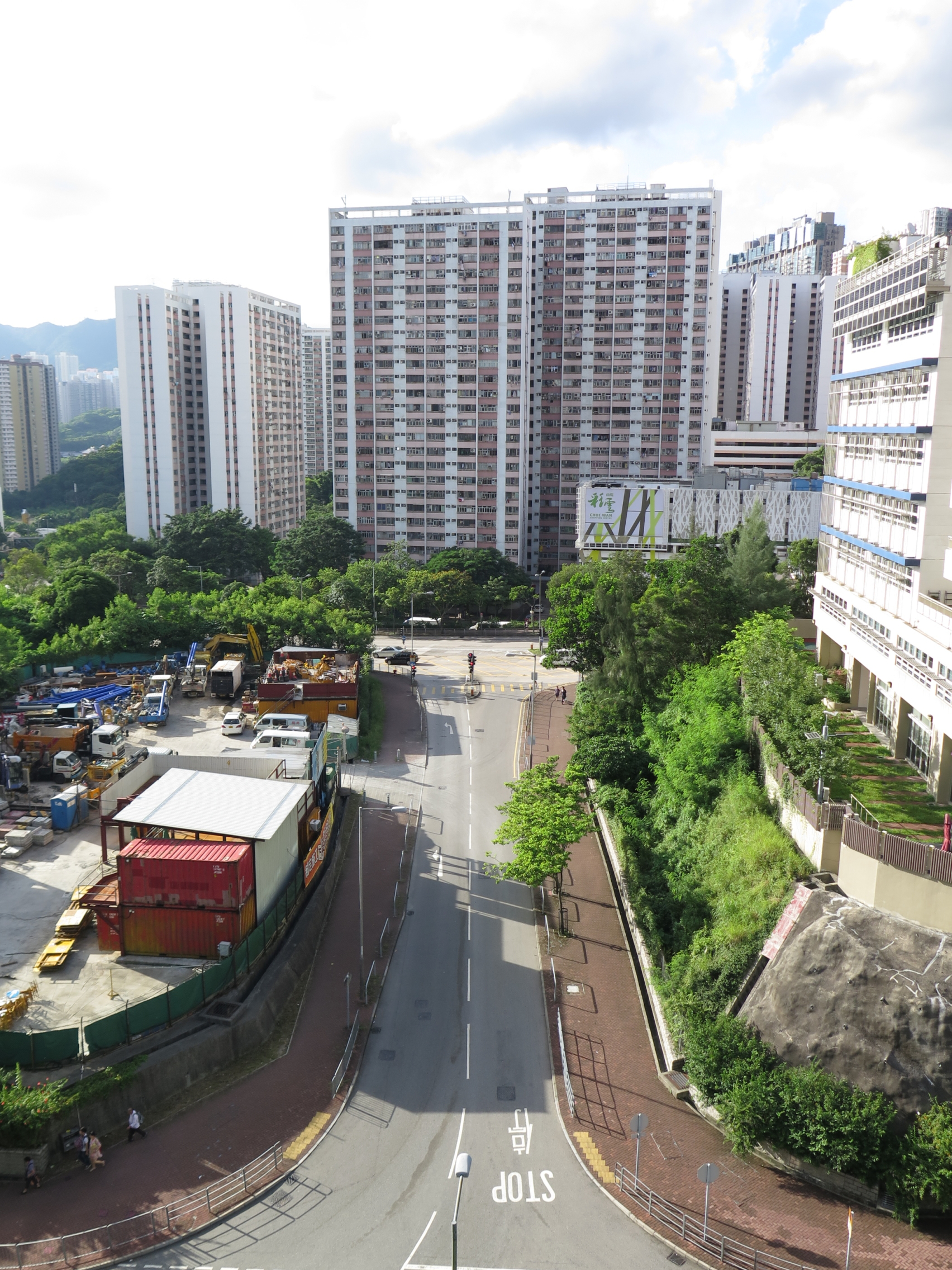 Choi Hing Line